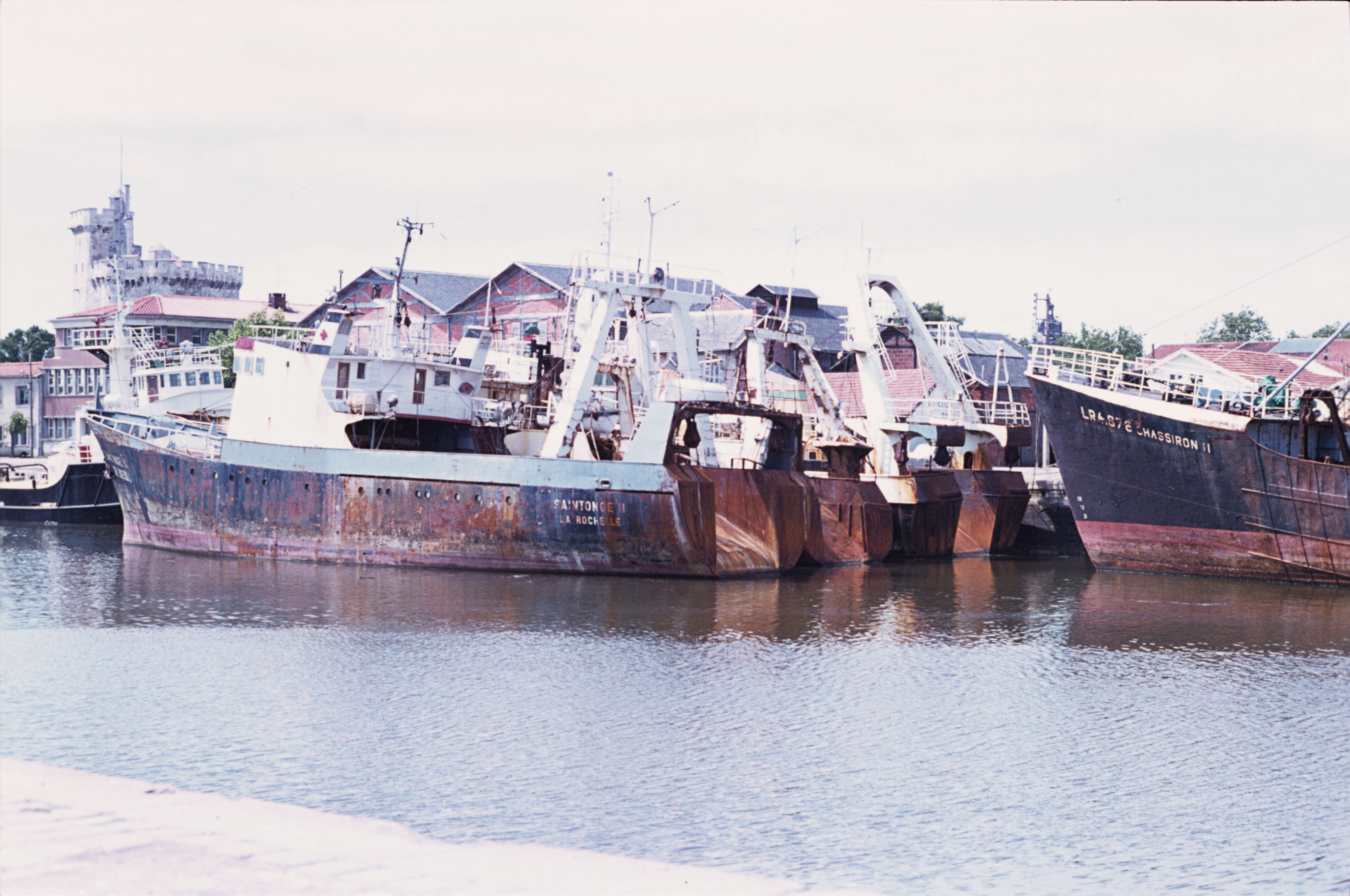 Des chalutiers de pêche industrielle en souffrance amarrés dans le bassin des chalutiers du port de La Rochelle. Ces bateaux de pêche, rouillés, quasiment abandonnés par leurs armateurs qui ne savaient plus qu'en faire, ont représenté les vestiges d'une époque révolue durant laquelle le port de La Rochelle fut un centre important de pêche. Le chalutier le plus à l' extérieur est le "Saintonge II". La Rochelle, Charente Maritime, France.